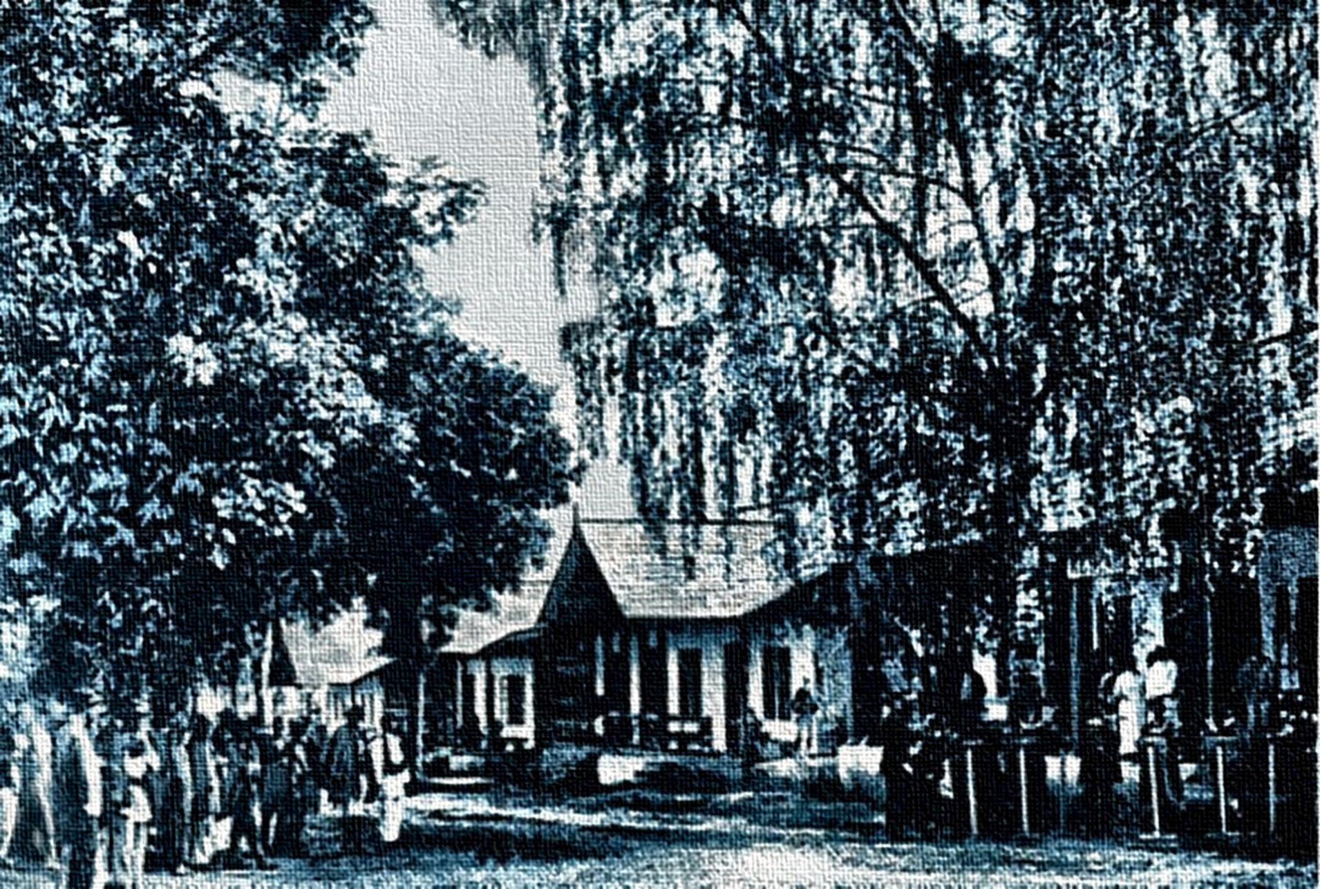 Bad Lopuszna vor 1900 Ausschnitt von einer alten Postkarte